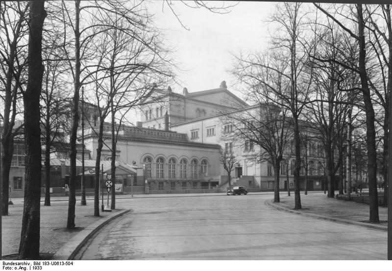 Berlin, Krolloper ADN-ZB/ Archiv Deutschland; Die Krolloper in Berlin 8471-33 [Scherl Bilderdienst] [1933]